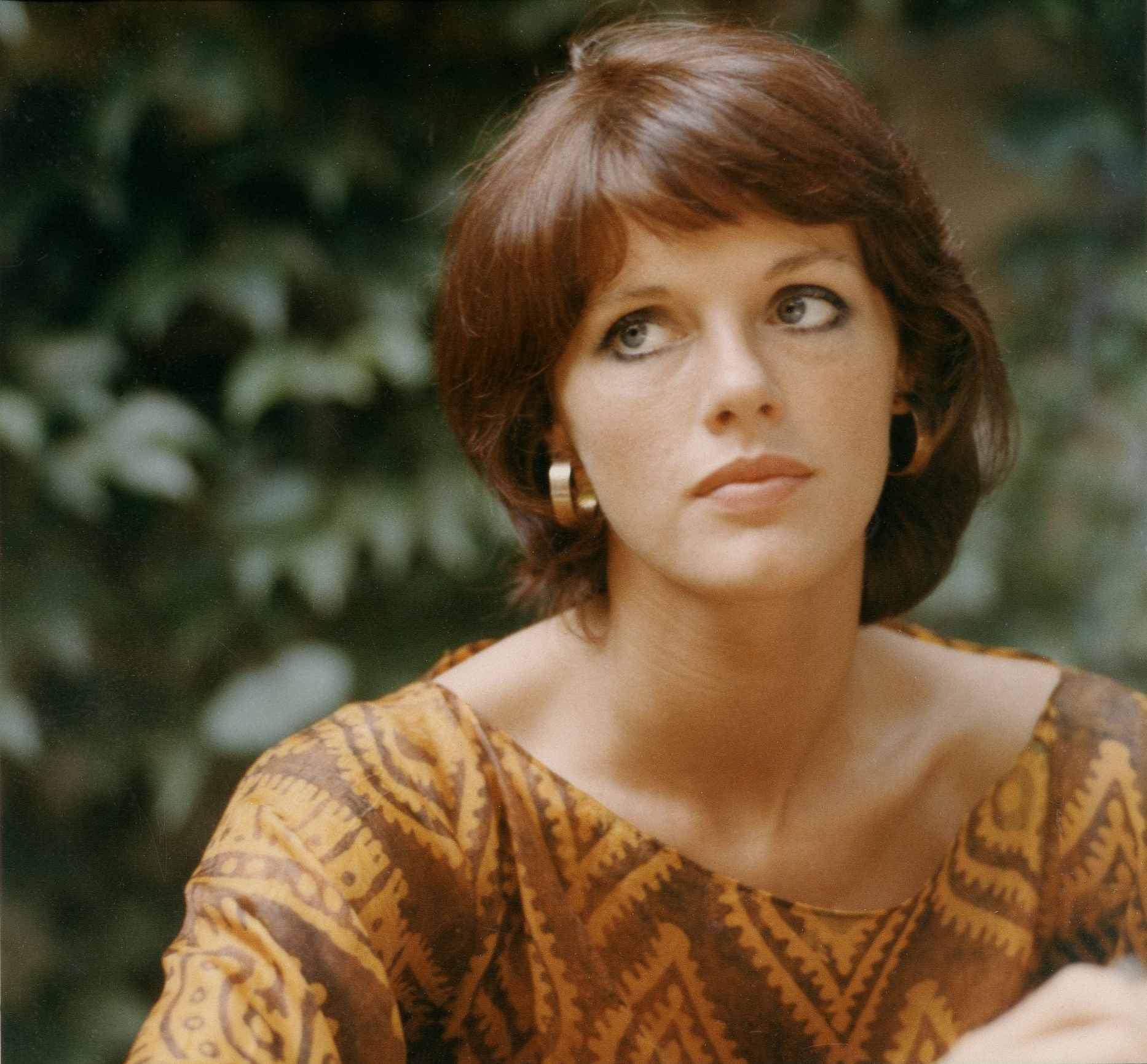 Anny Duperey. Portrait par Fernand Michaud. Festival d'Avignon 1971